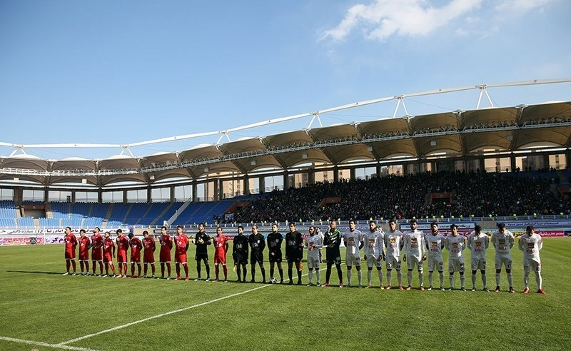 مسابقه میان پدیده خراسان و تراکتورسازی تبریز در ورزشگاه امام رضا خراسان